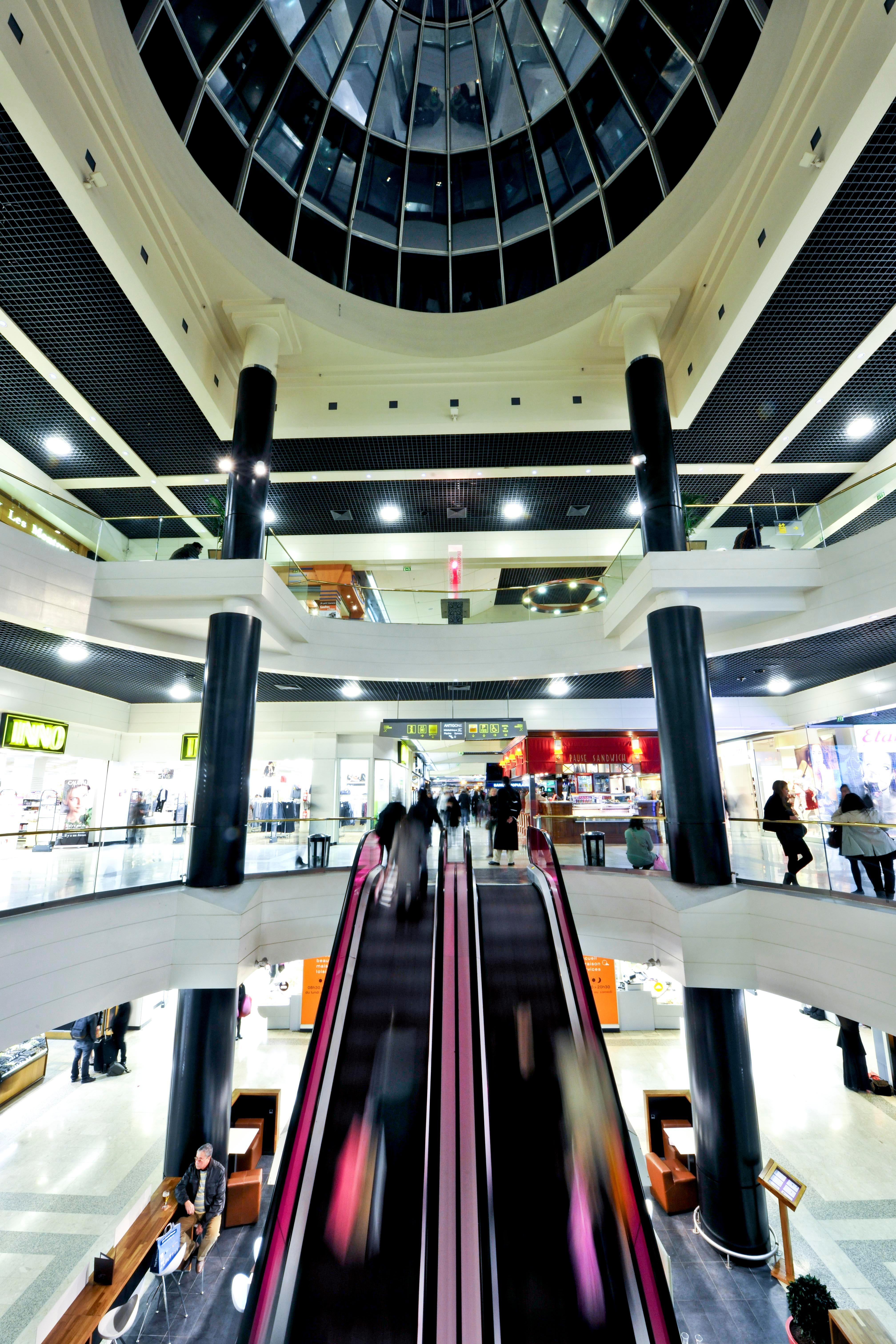 Intérieur Polygone